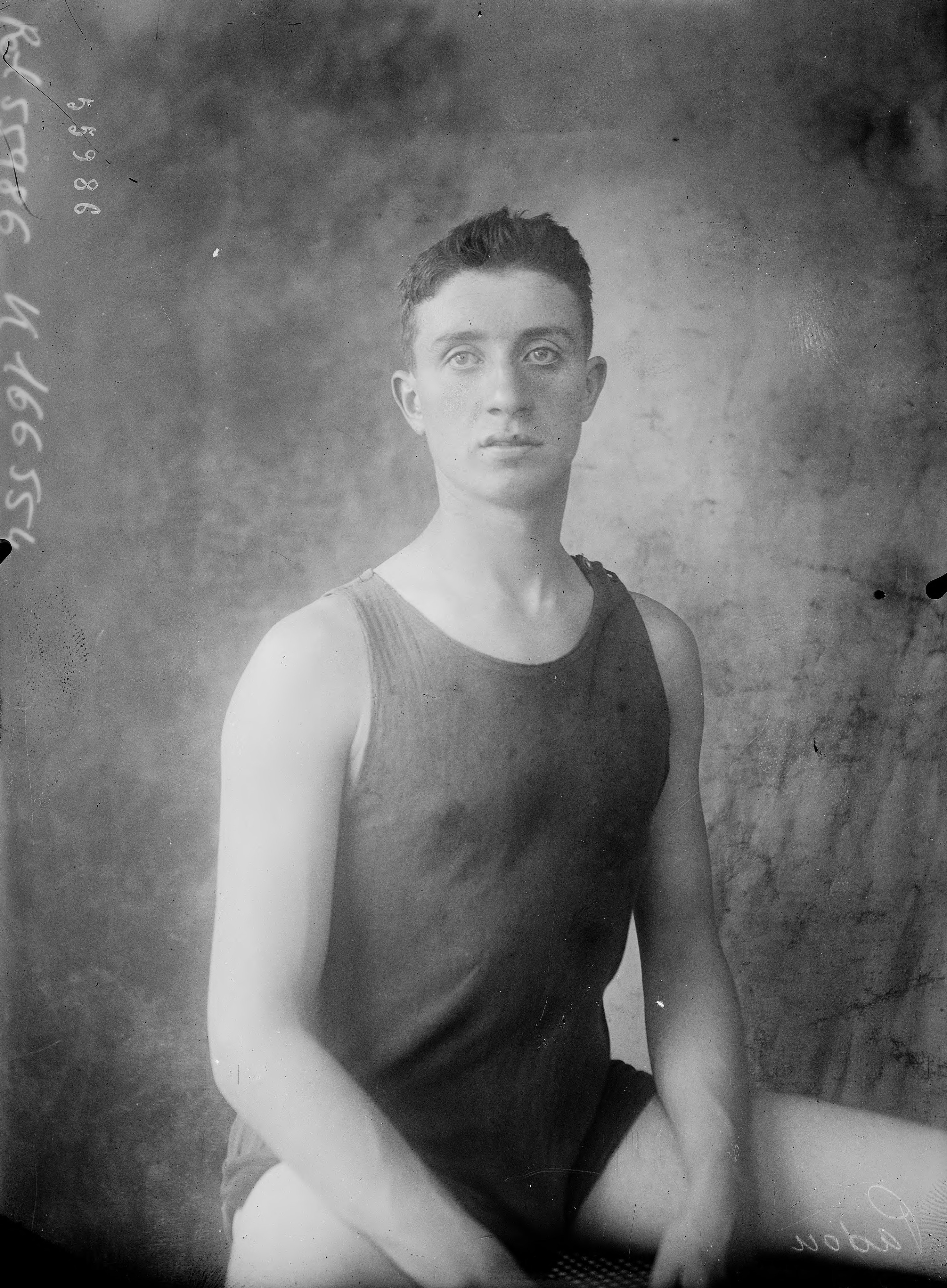 Henri Padou, joueur de water-polo français.